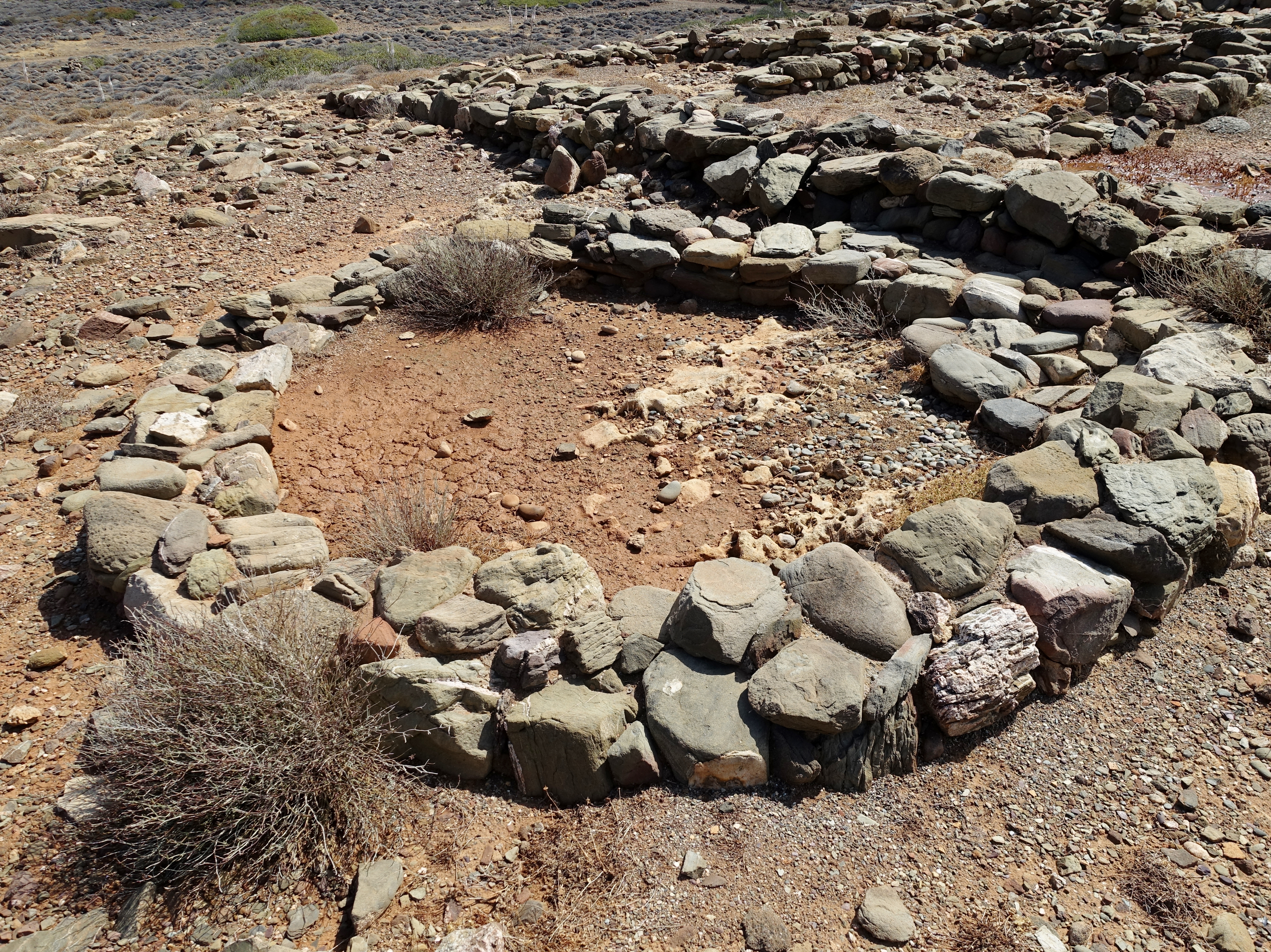 Minoisches Landhaus von Agia Photia (Αγία Φωτιά) aus der mittelminoischen Phase MM I A auf dem Hügel Koufota (Κουφοτά), Gemeinde Sitia, Kreta, Griechenland